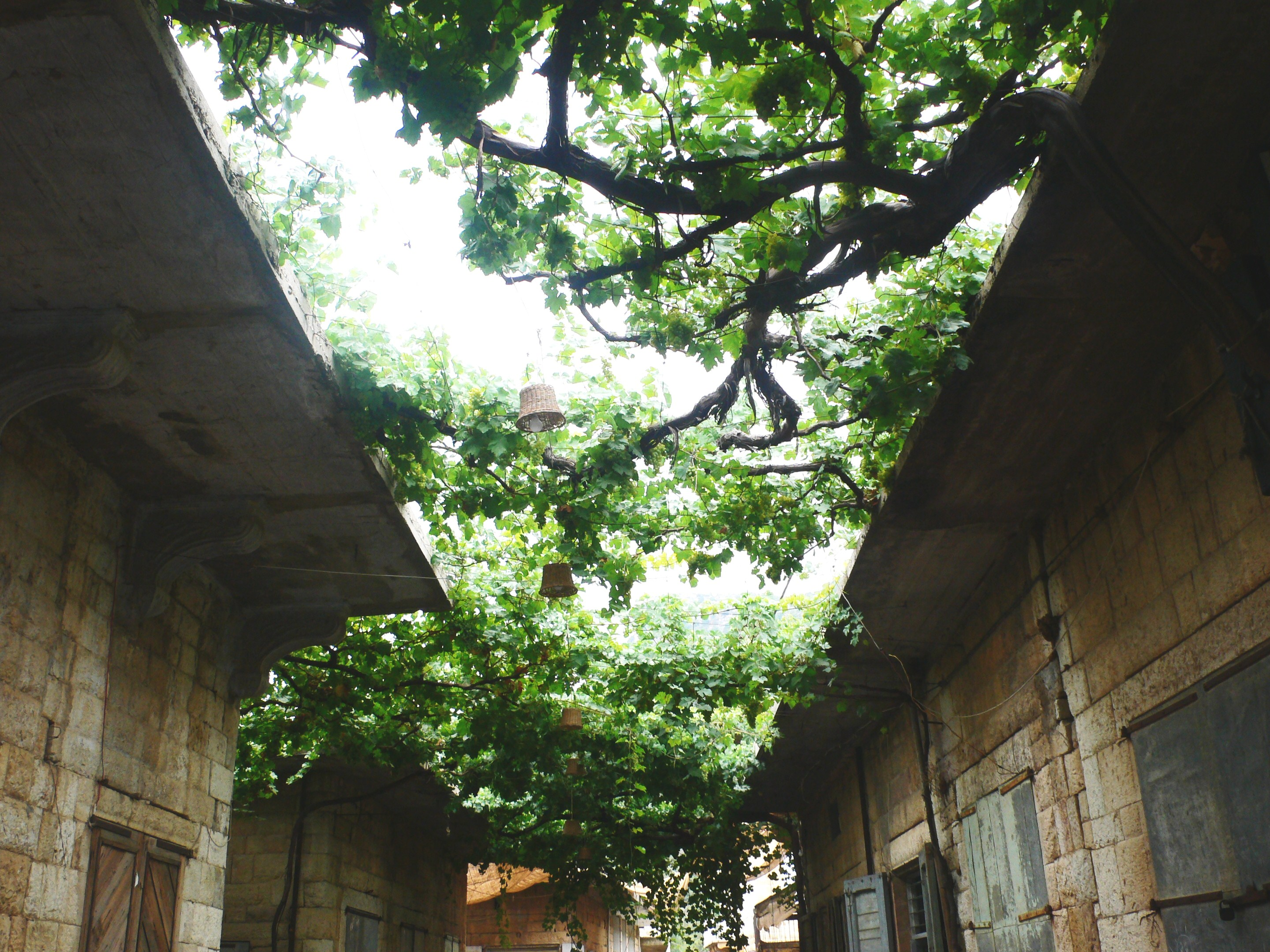 Douma en 2009